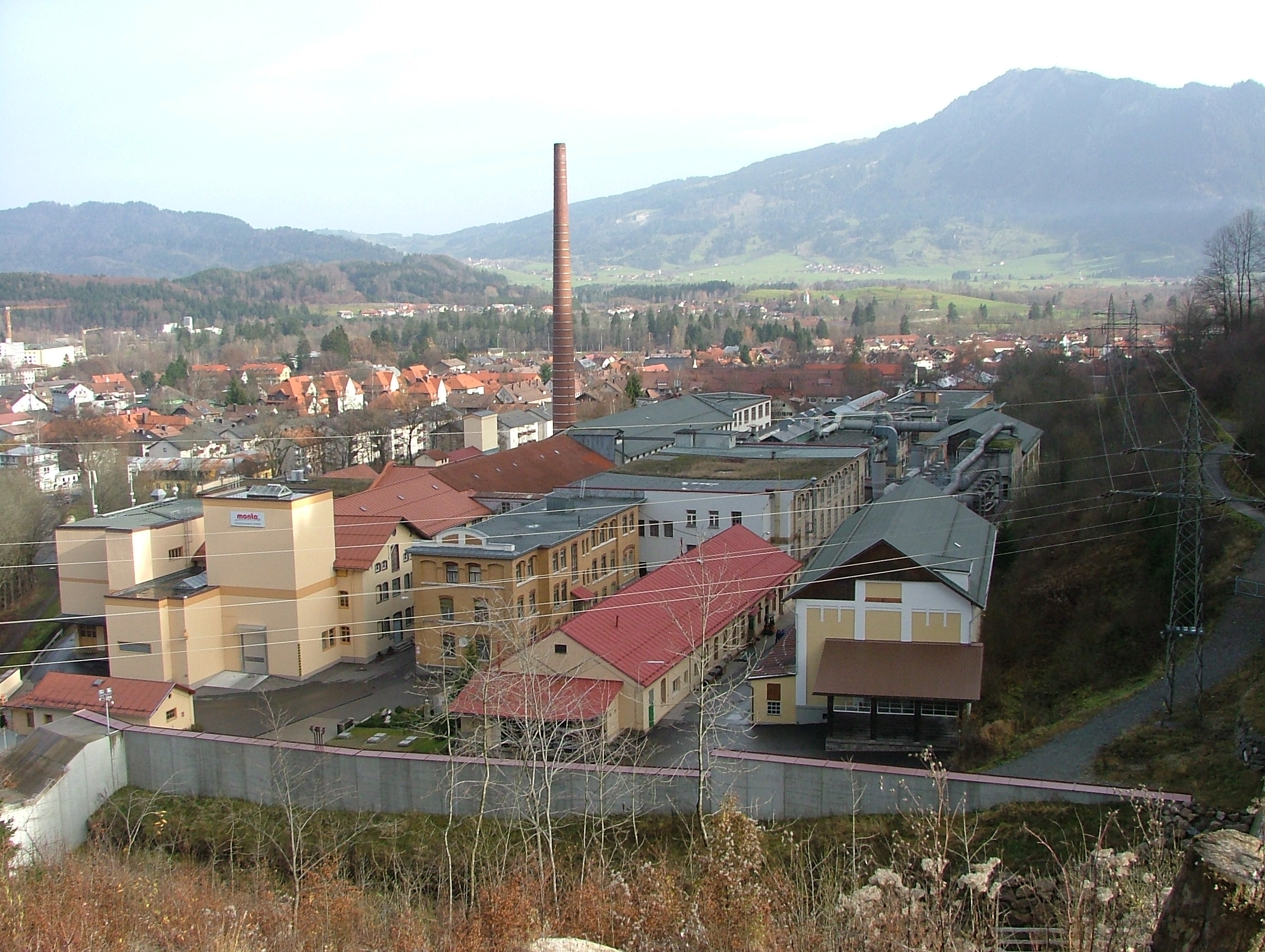 Ehemalige Bindfadenfabrik